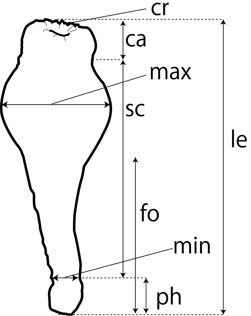 Sphenopus exilis, morfología externa de un pólipo contraído. Abreviaturas: ca = capitulum; cr = cresta capitular; fo = pie; le = altura; max = ancho máximo; min = ancho mínimo; ph = physa; sc = scapus, columna. Fujii T, Reimer JD (2016) A new solitary free-living species of the genus Sphenopus (Cnidaria, Anthozoa, Zoantharia, Sphenopidae) from Okinawa-jima Island, Japan. ZooKeys 606: 11-24.